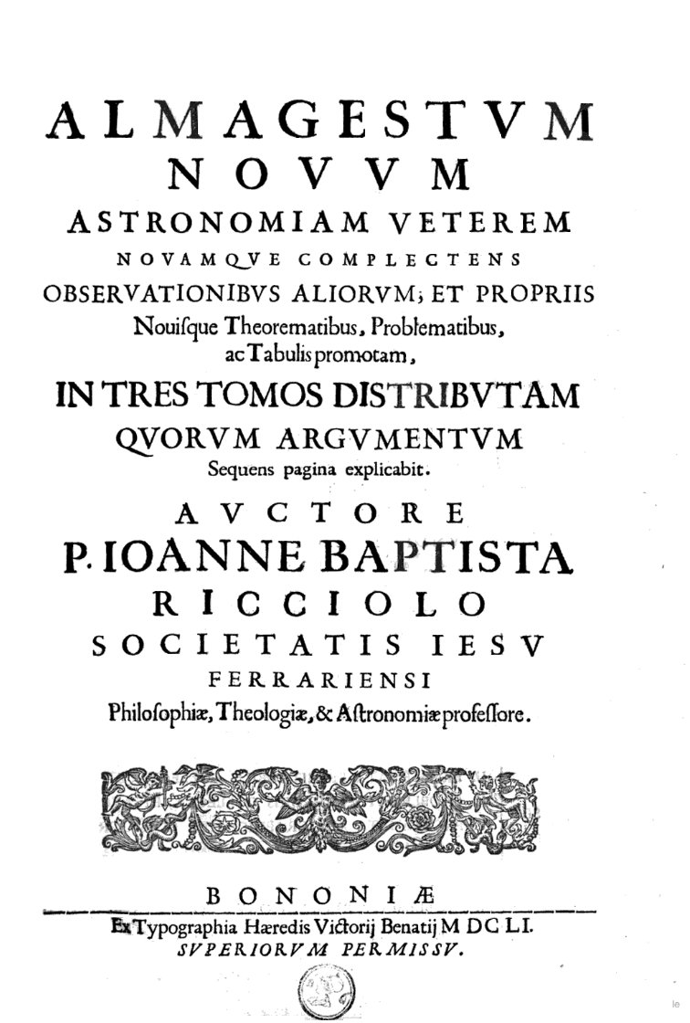 Primera página del Almagestum Novum